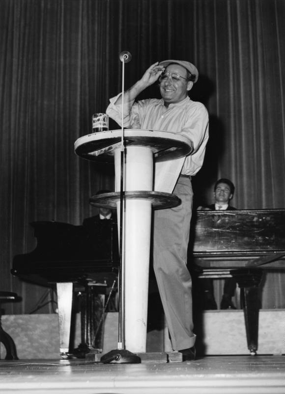 Kabarett, Die Insulaner Gastspiel im Metropol in Bonn Die Insulaner war eine von Günter Neumann gegründetet Kabarettsendung, die von 1948 bis 1964 zum Programm des RIAS gehörte.